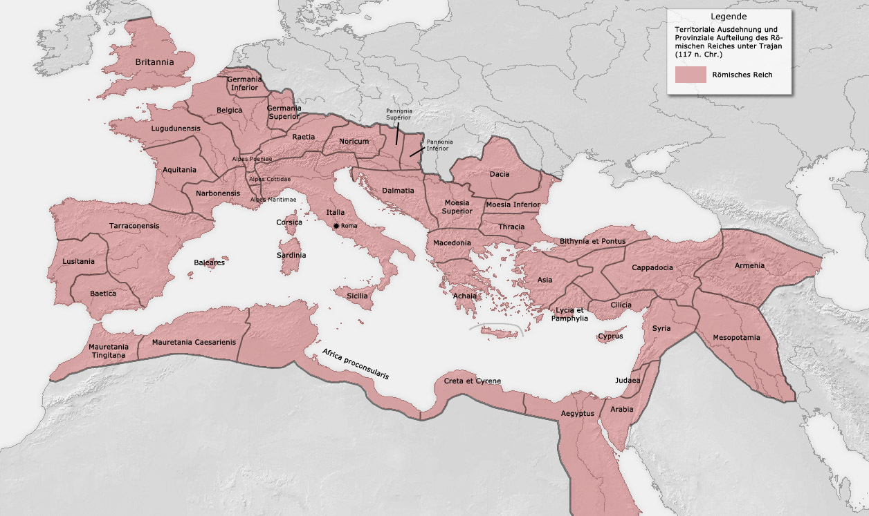 Territoriale Ausdehnung und Provinziale Aufteilung des Roemischen Reiches unter Trajan, 117 n. Chr.